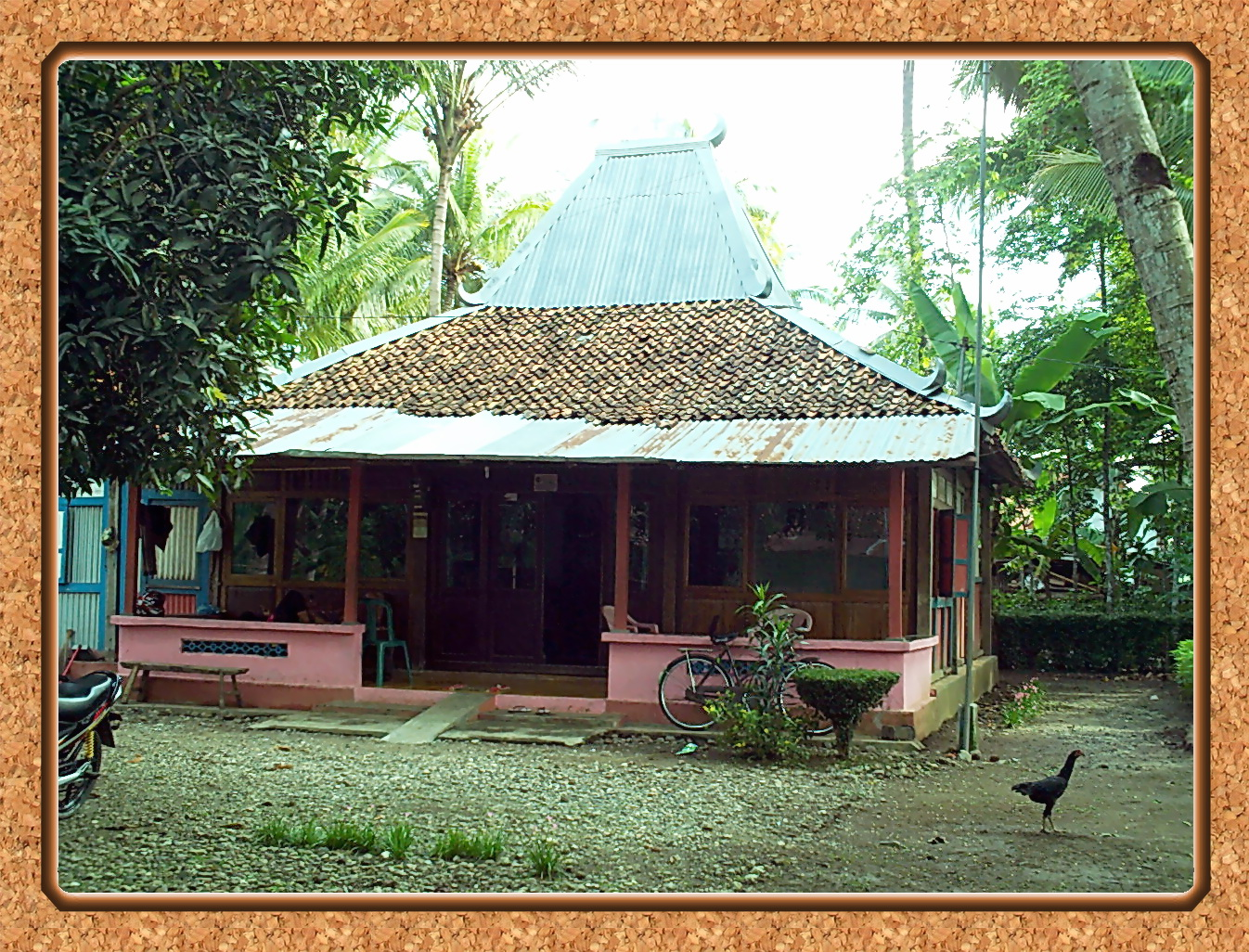 Rumah Kampung